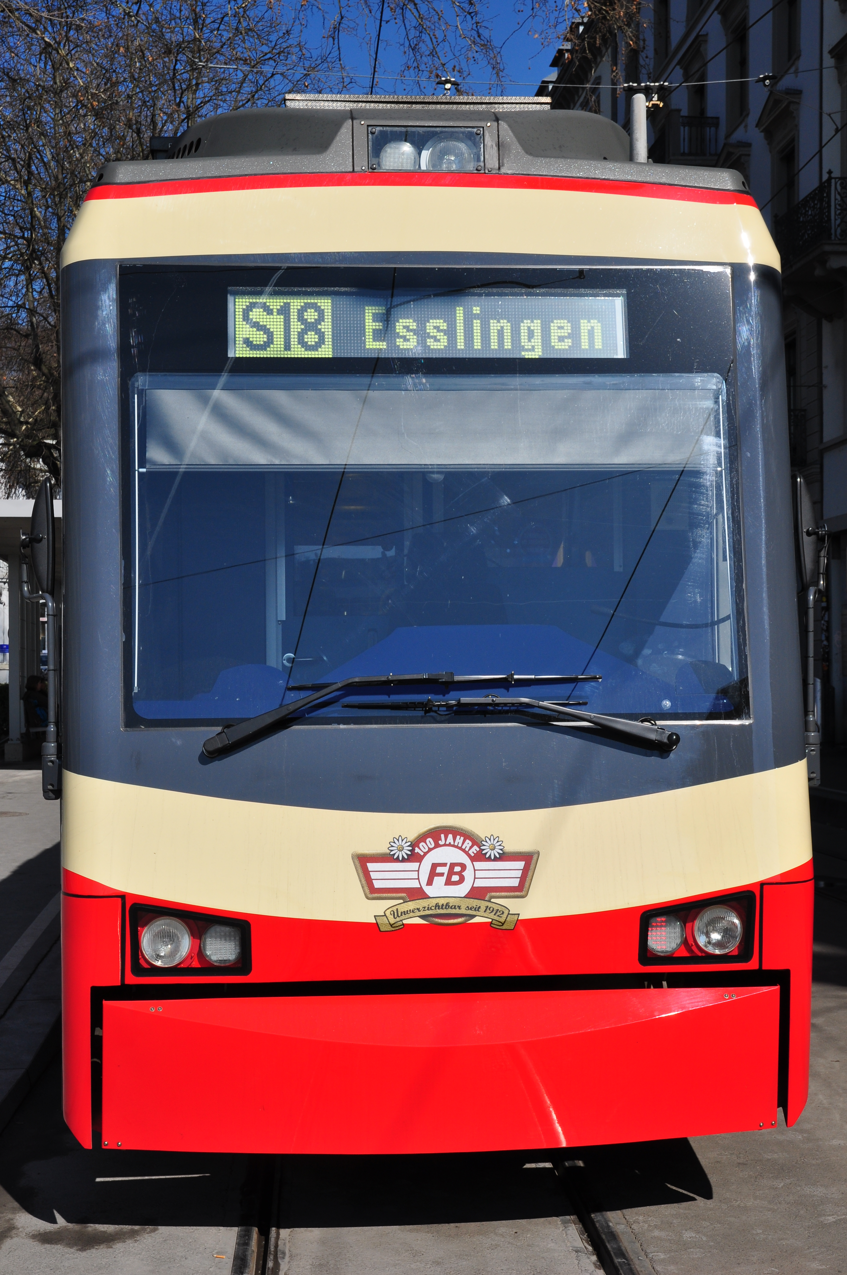 100 Jahre FB (Forchbahn), Stadelhoferplatz in Zürich-Mühlebach (Switzerland)